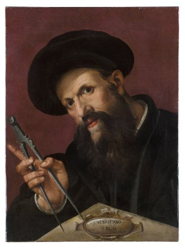 Huile sur toile - 59,5 x 44,5 cm Wurtzbourg, Martin von Wagner Museum Photo : Galerie Canesso